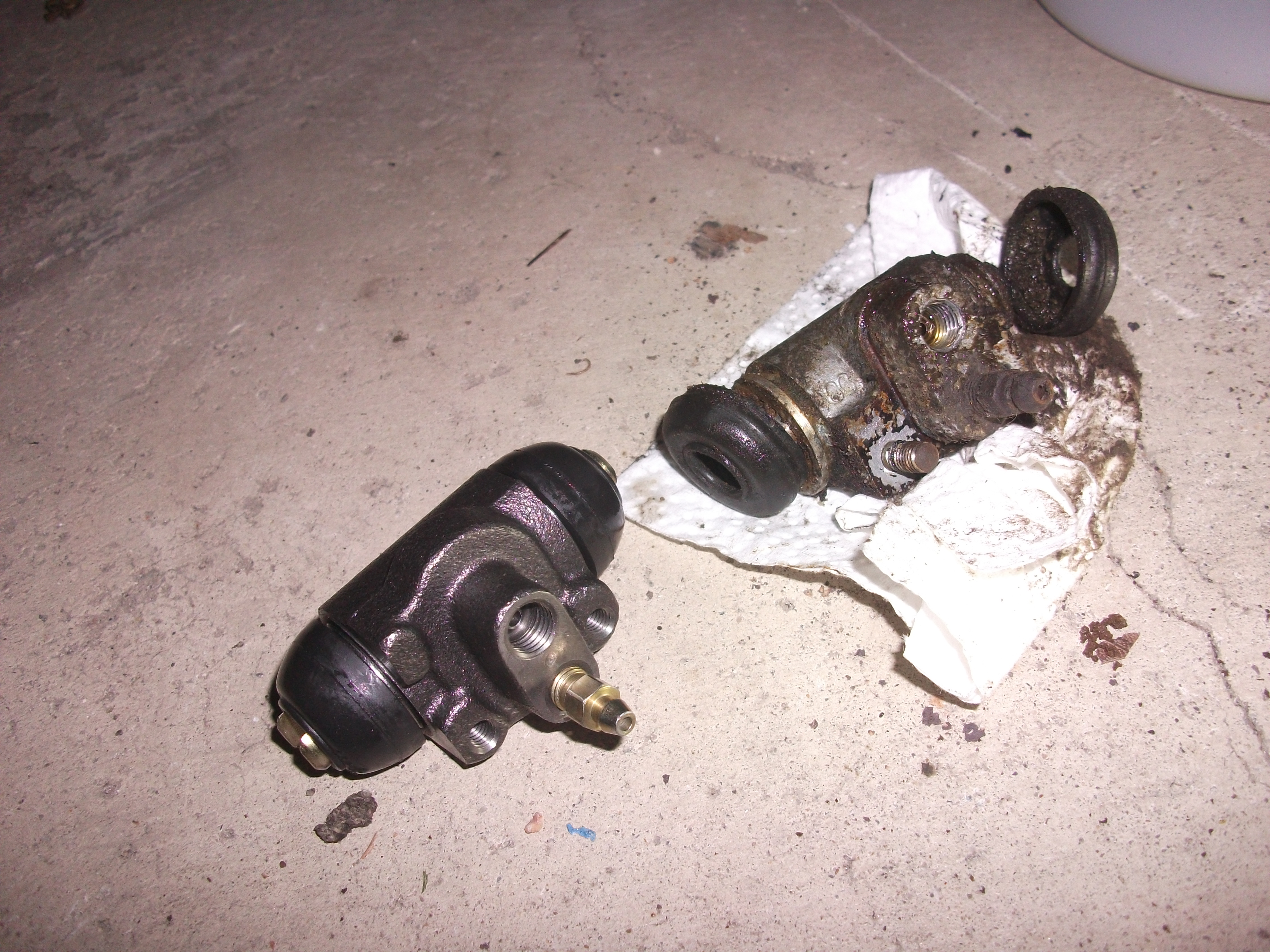 new versus old brake cylinder